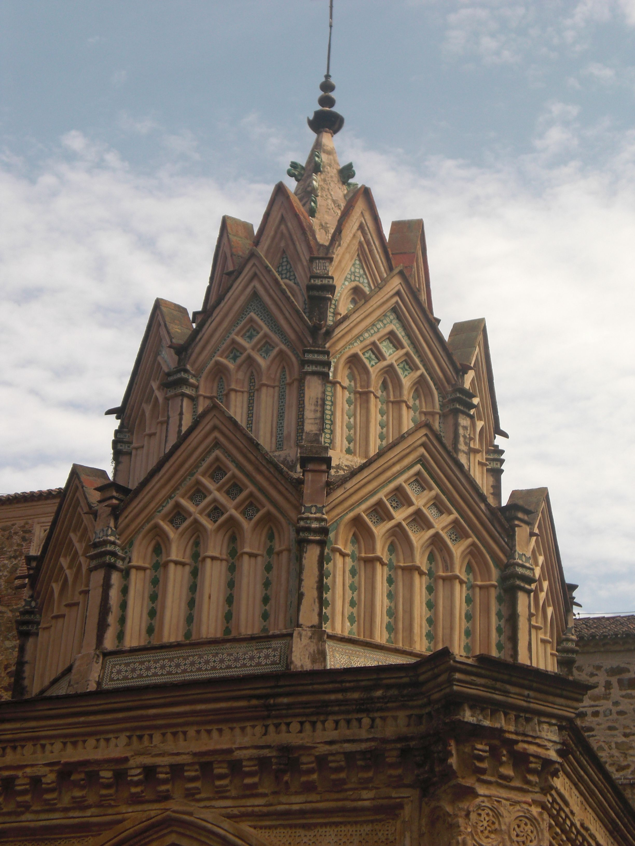 Supra parto de la templeto de Guadalupe